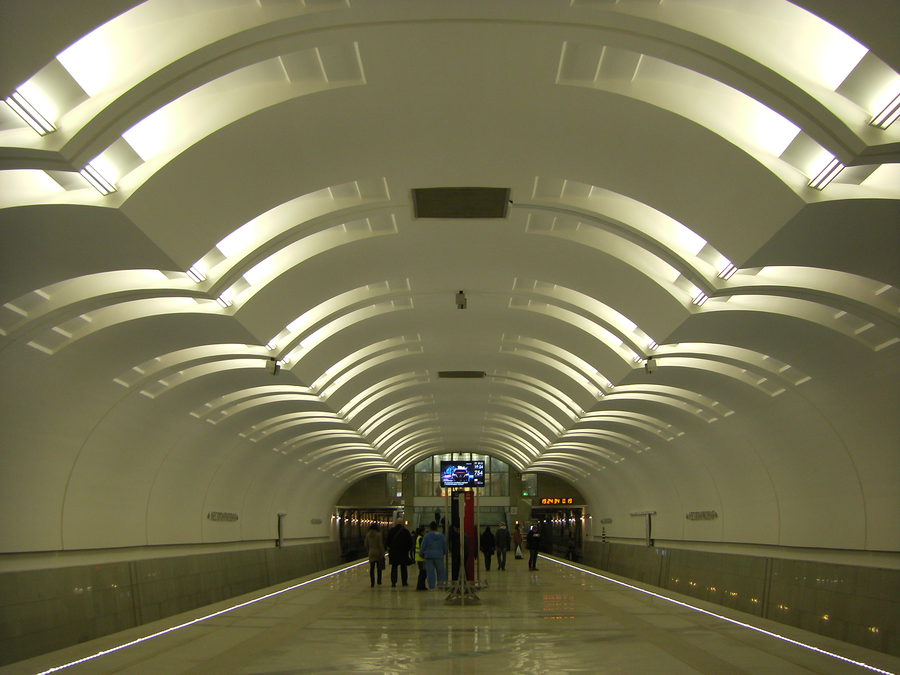 фотография станции метро «Лесопарковая»